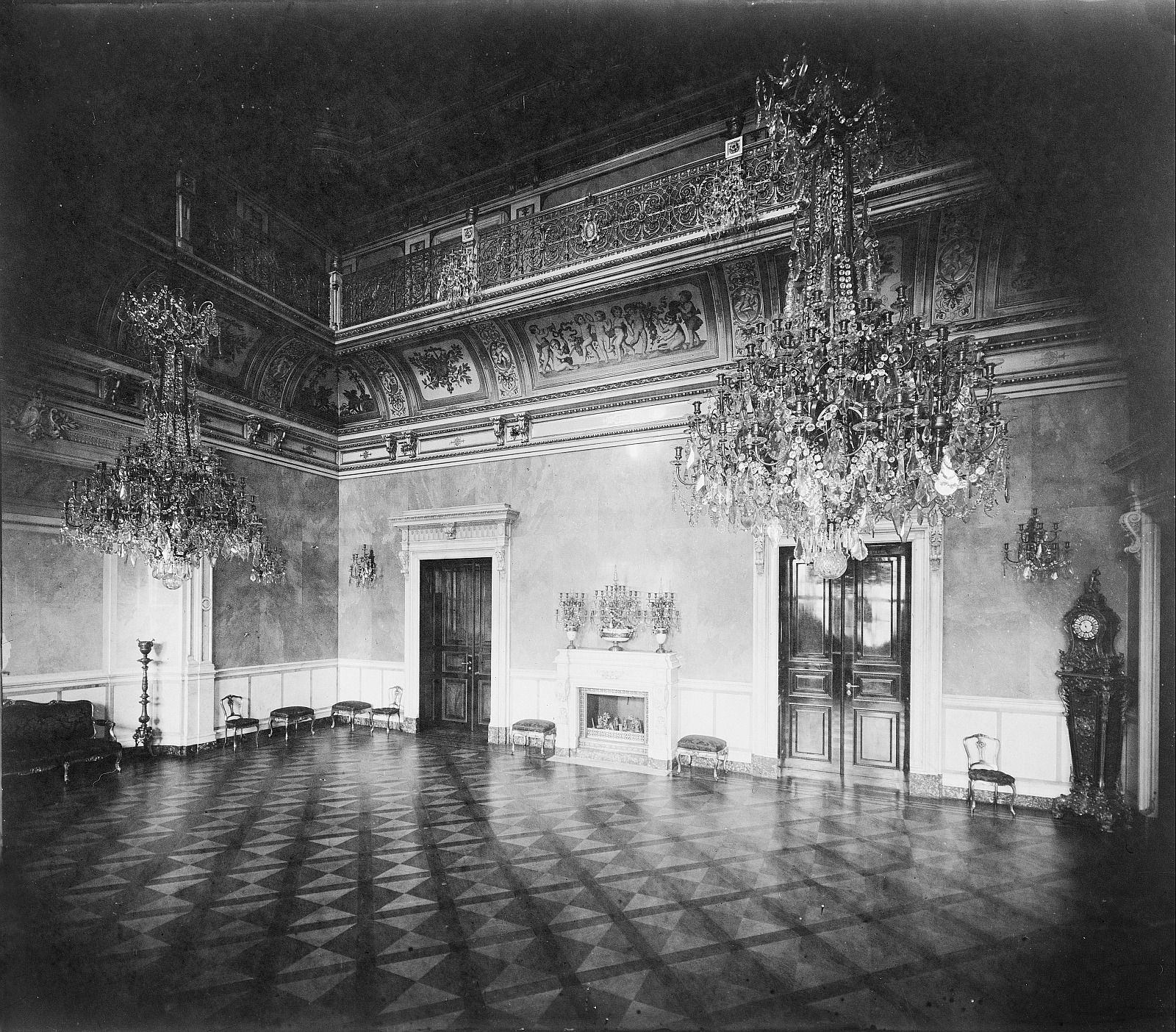 Hermann Krone: Der kleine Ballsaal im Dresdner Schloss. Photographie; 30 × 40 cm.